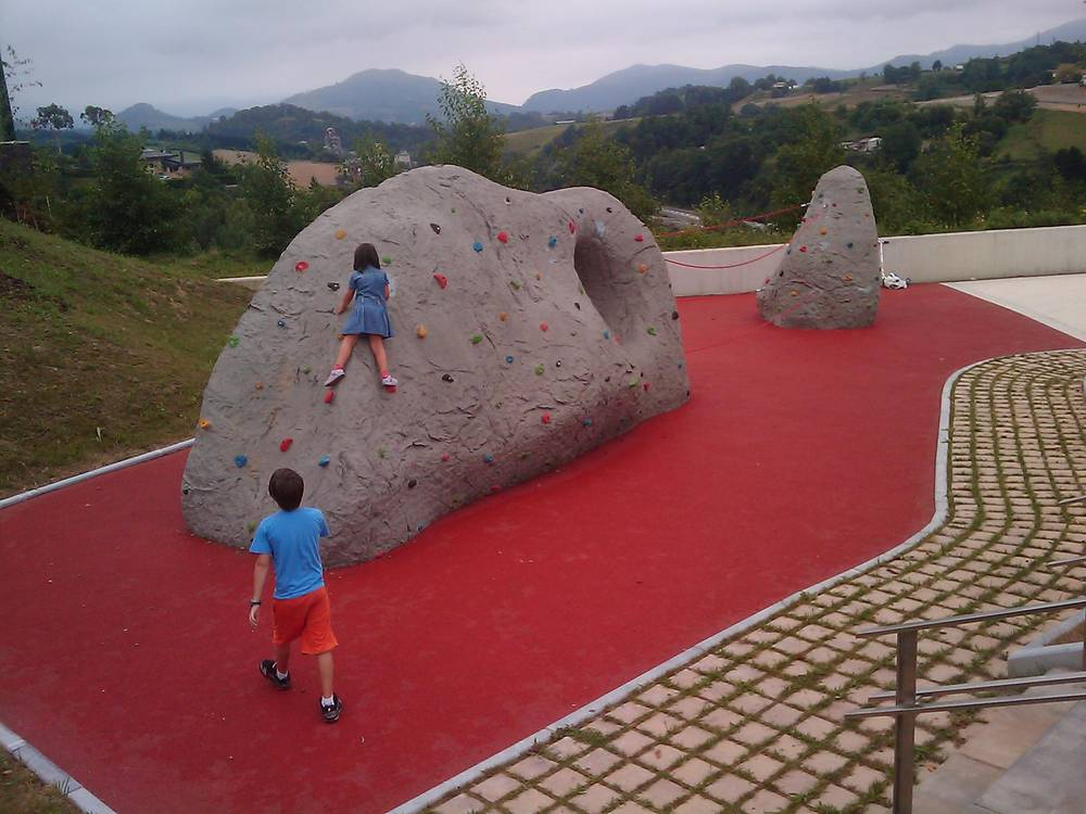 Aieteko kirol ekipamenduen gunea eta jolas parkea (Donostia)